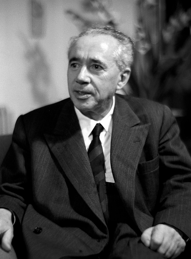 Giulio Natta